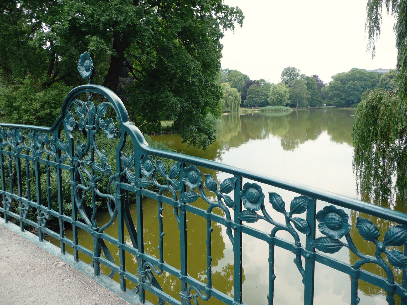 Maschteichbrücke